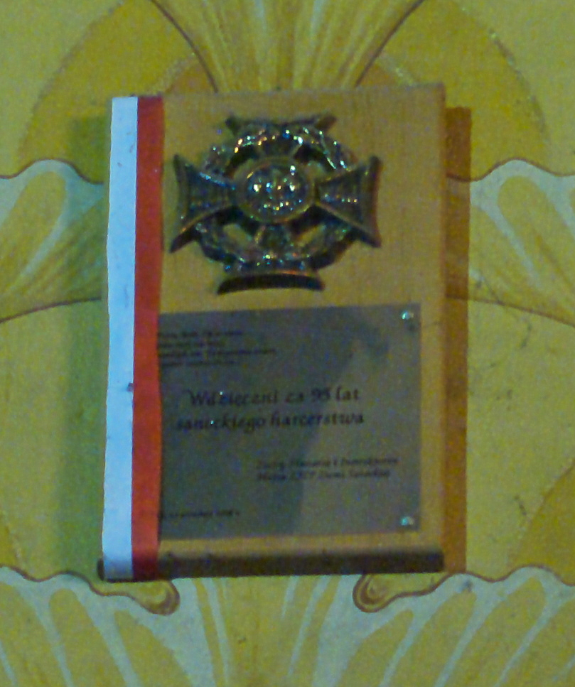 Tabliczka upamiętniająca Hufca ZHP Sanok z inskrypcją "Wdzięczni za 95 lat sanockiego harcerstwa" w Kościele Przemienienia Pańskiego w Sanoku.